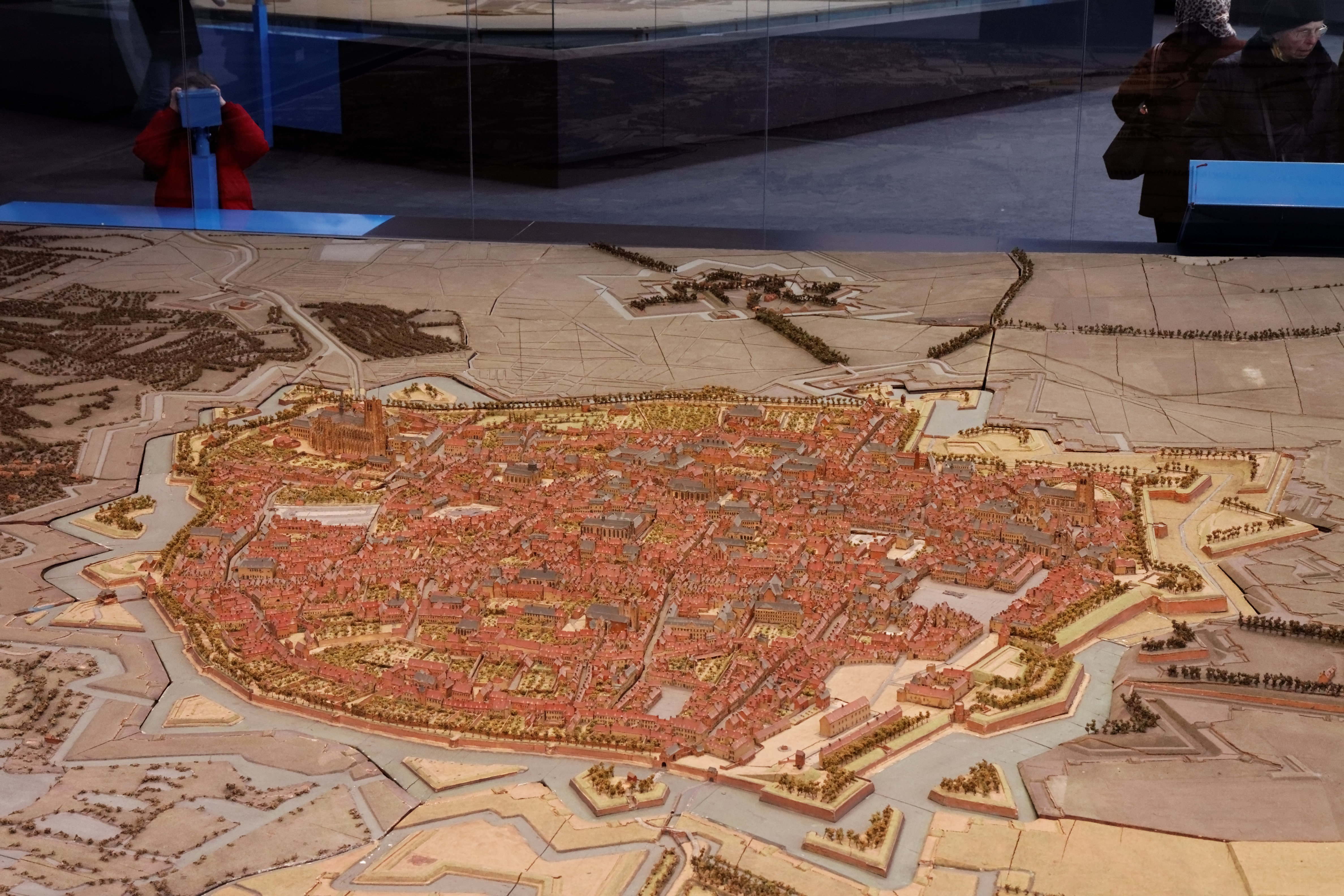 Plan-relief de Saint-Omer, vue de l'est. Plan-relief construit en 1758 sous la direction de Jean-Baptiste Larcher d'Aubencourt (1711-1793). Échelle 1/600e